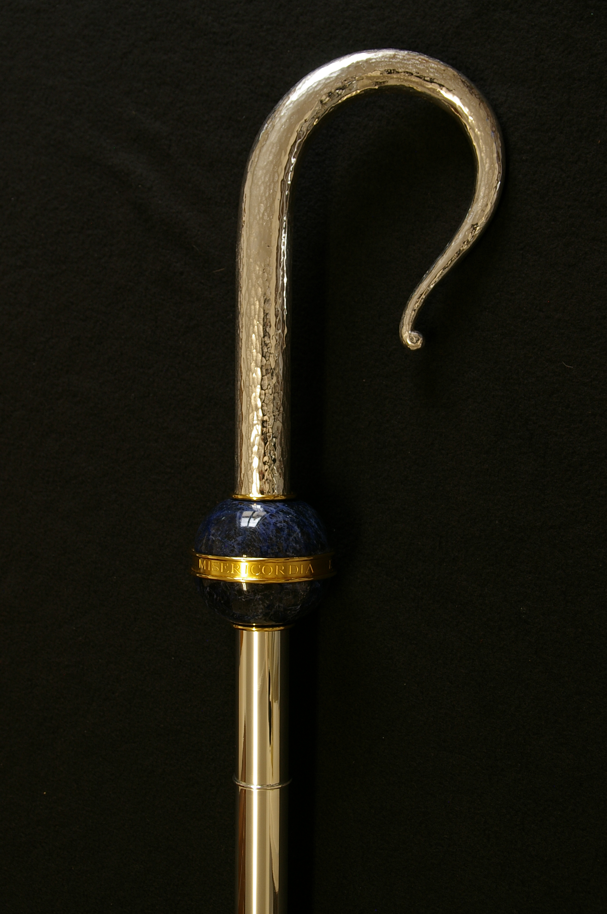 Crosse de Mgr Gobilliard par L.-G. Piéchaud